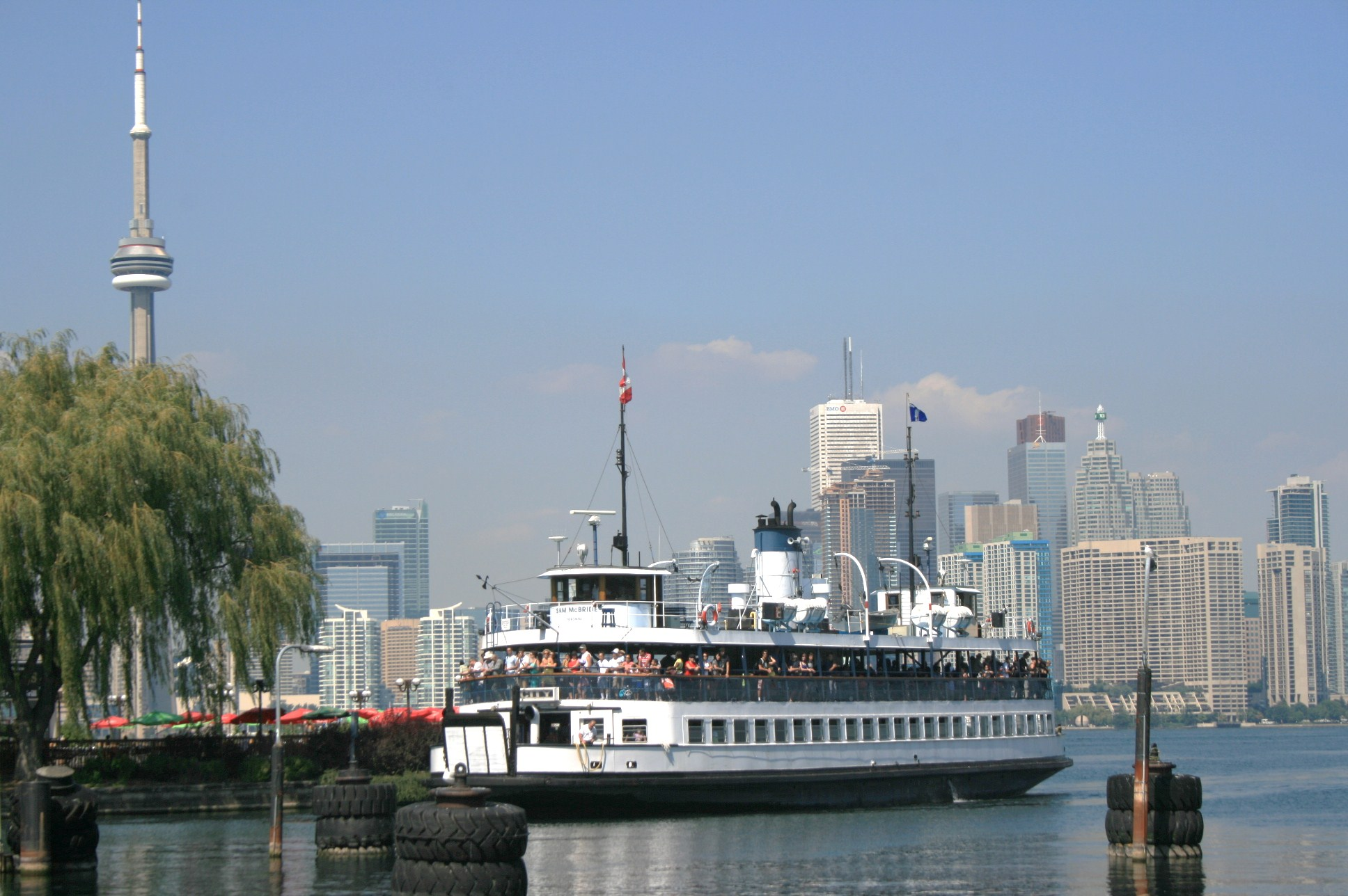 Toronto Ferry